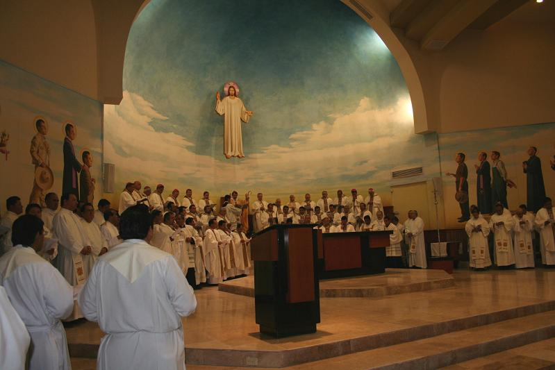 Interior de la Catedral de Piedras Negras